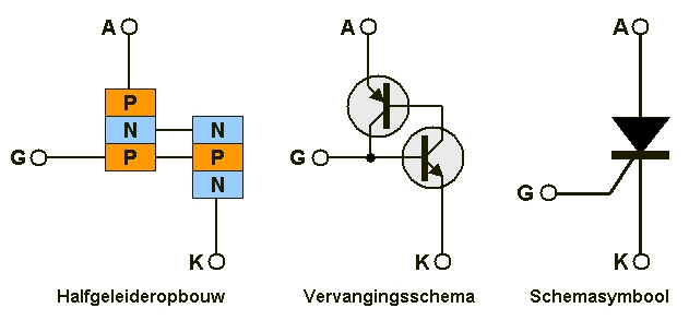 Door de auteur zelf vervaardigde afbeelding.